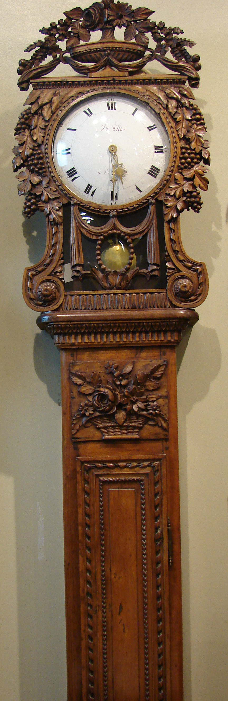 Inv. 2011.16.1 Signée Jn (Jean) Allix à St Nicolas